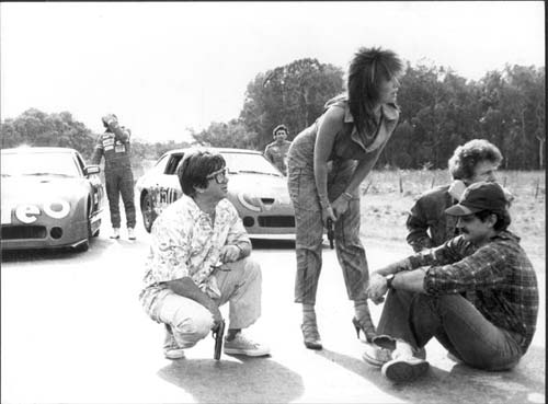 Fotografía blanco y negro sobre papel fotográfico brillante. Escena en exteriores de la película Brigada explosiva contra los ninjas donde aparecen en primer plano de izquierda a derecha: Alberto Fernández de Rosa agachado; Moria Casán de pie; Emilio Disi y Berugo Carámbula sentados en el piso. Detrás dos autos de carrera y sus pilotos de pie junto a las puertas.